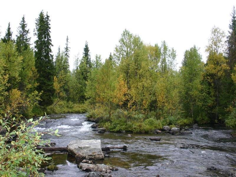 Der Fluss Galån in Jämtland, Schweden; the river Galån in Jämtland, Sweden